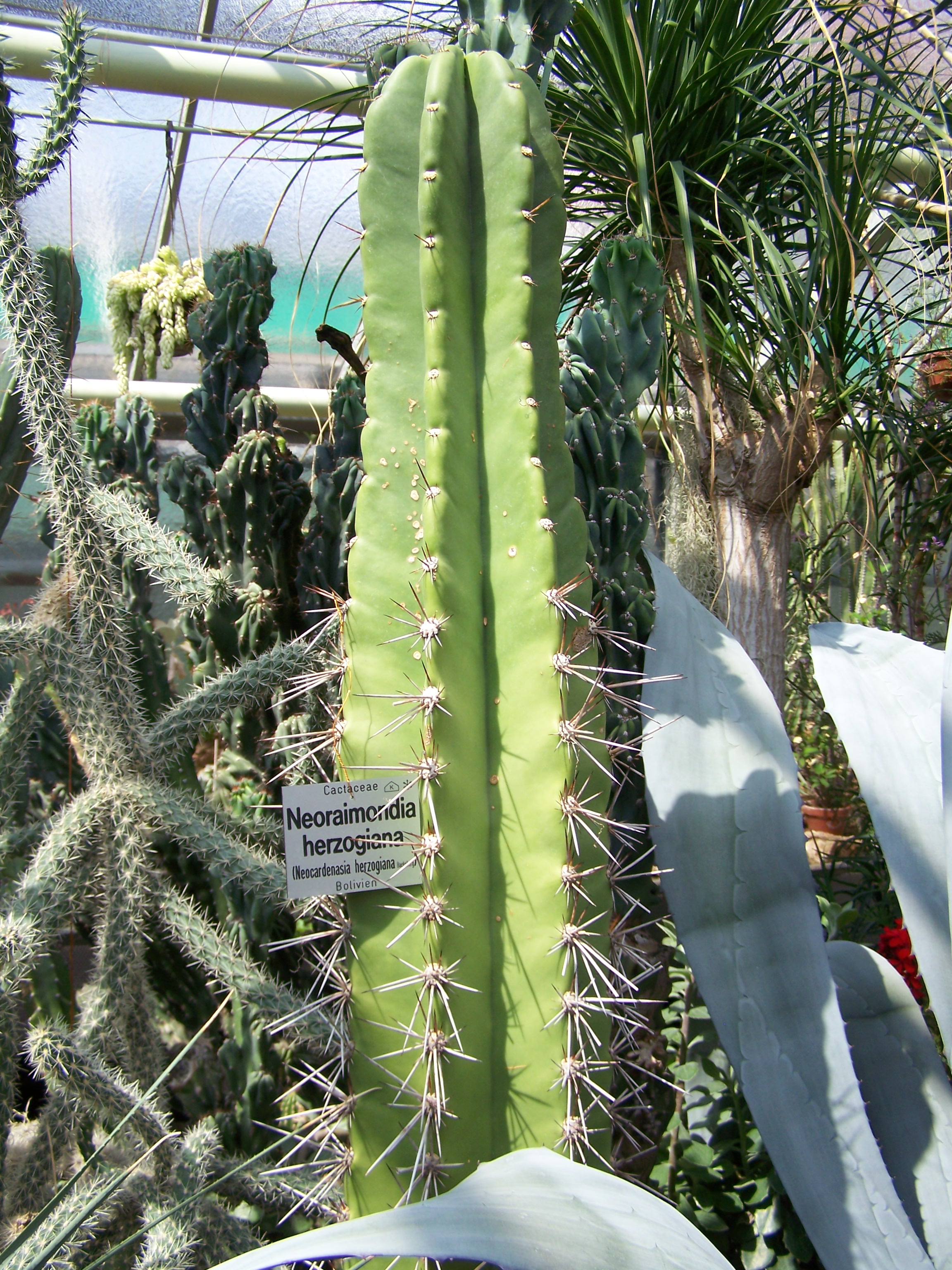 Das Bild stellt einen Neoraimondia herzogiana aus dem Botantischen Garten Erlangen dar.